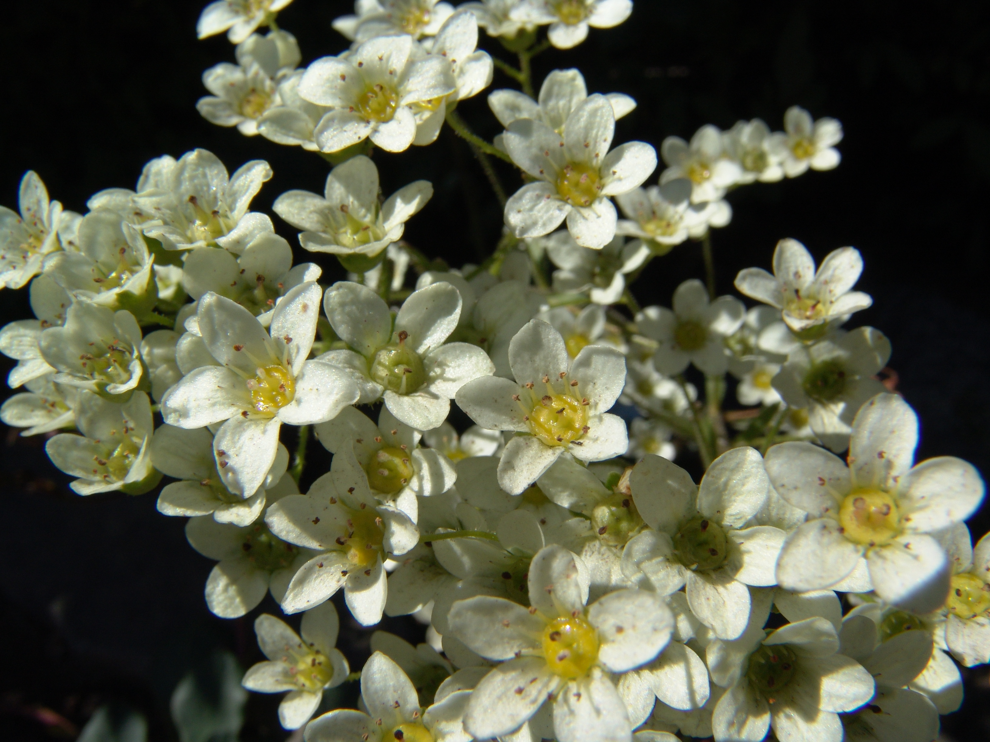 Island, Botanischer Garten Akureyri.